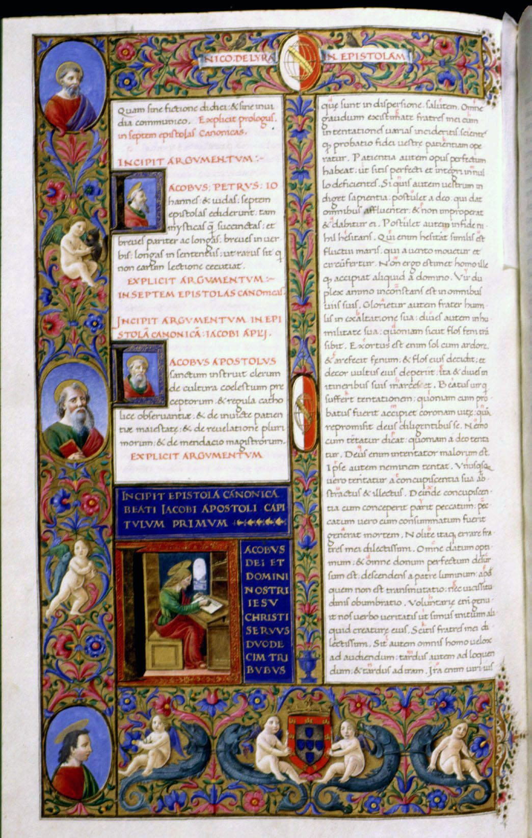 Bíblia dos Jerónimos, página do Vol. VII